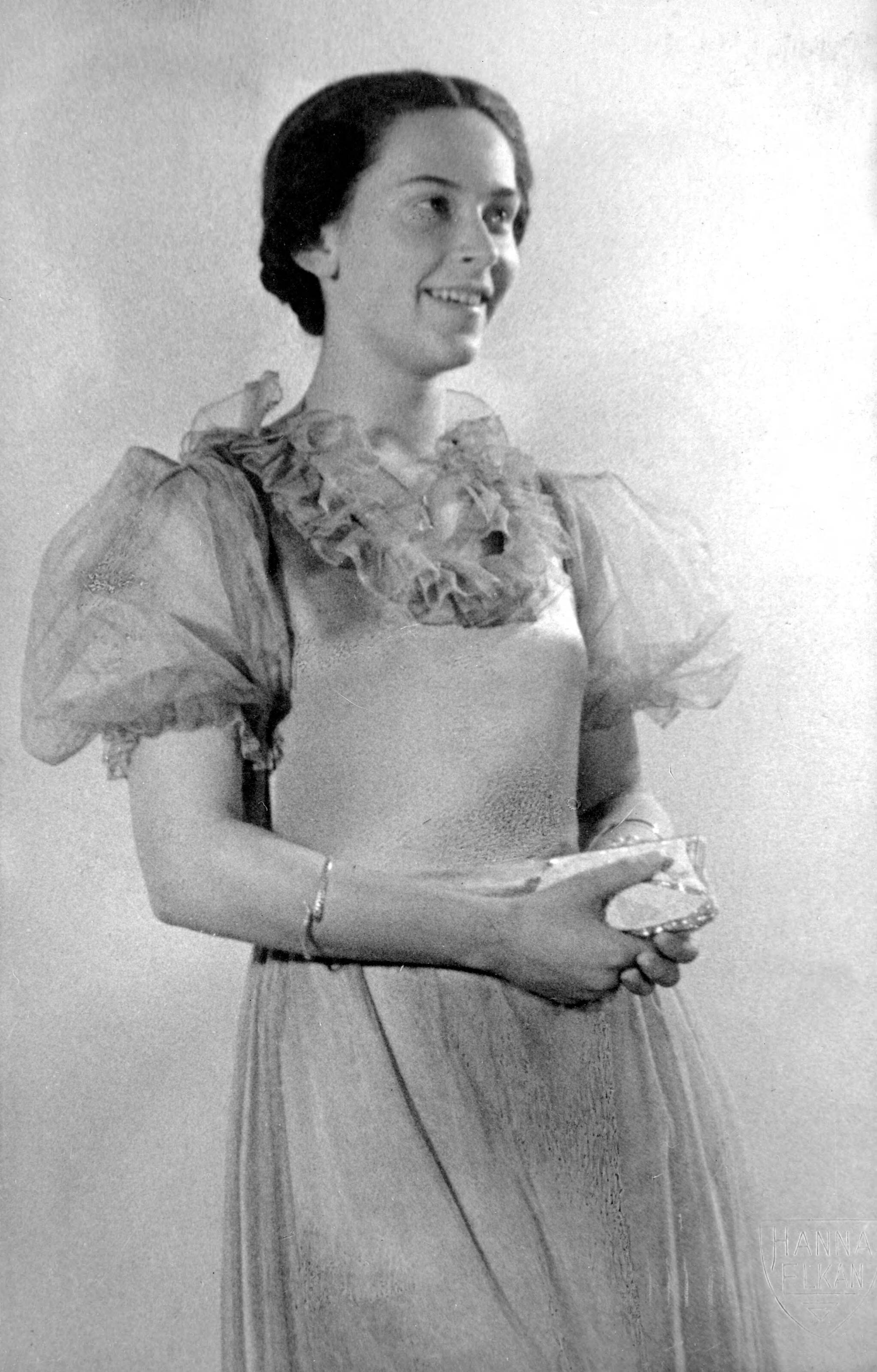 Portret van de Nederlandse verzetsheldin Reina Prinsen-Geerligs (1922-1943) in haar eerste uitgaansjurk. Geboren in Amsterdam, omgebracht in kamp Oraniënburg in Duitsland. Haar ouders hebben na haar dood een naar haar vernoemde literaire prjs in het leven geroepen. Amsterdam, 1940-1943.